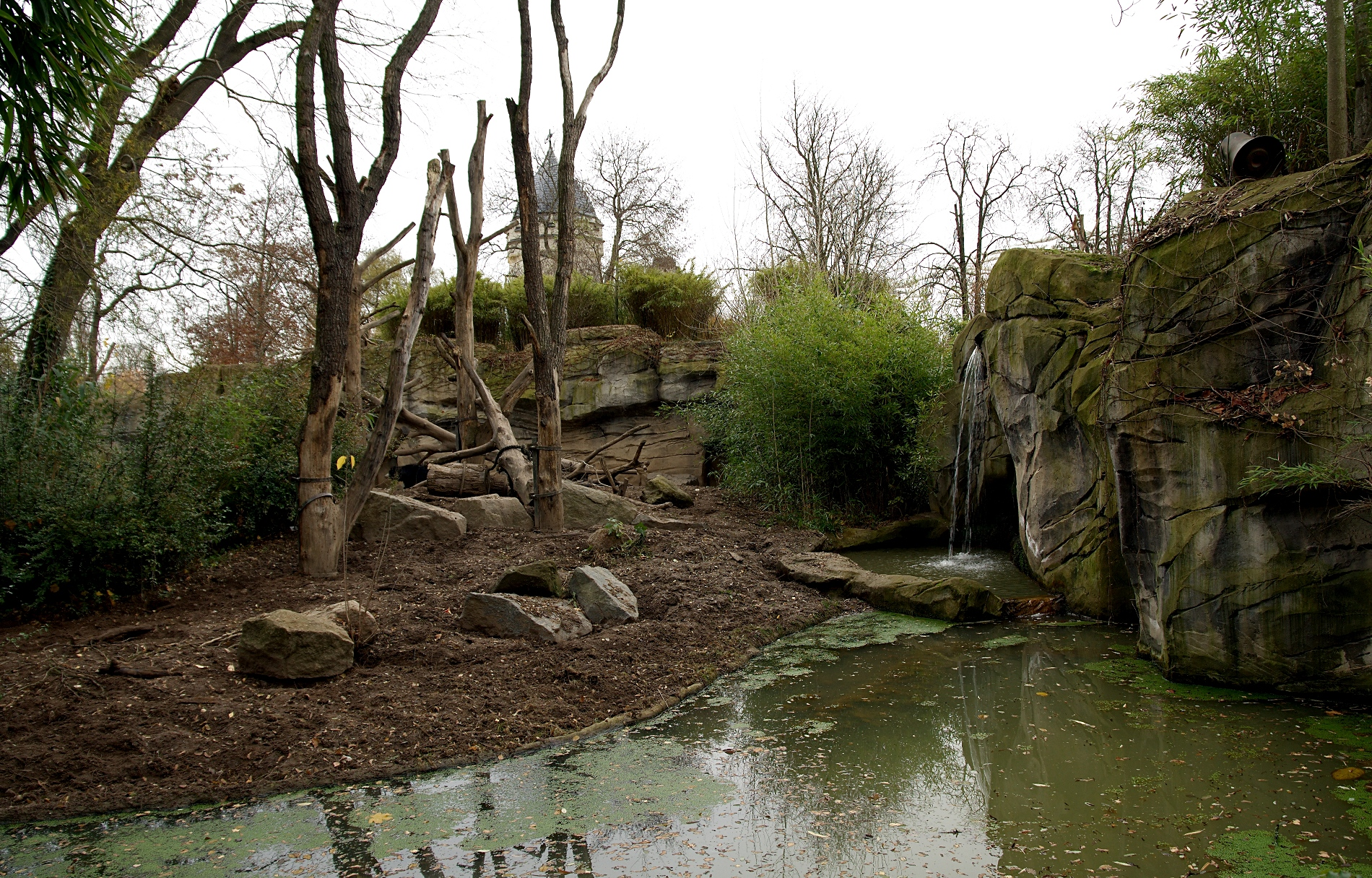 Linker Teil der Lippenbärenschlucht im Leipziger Zoo